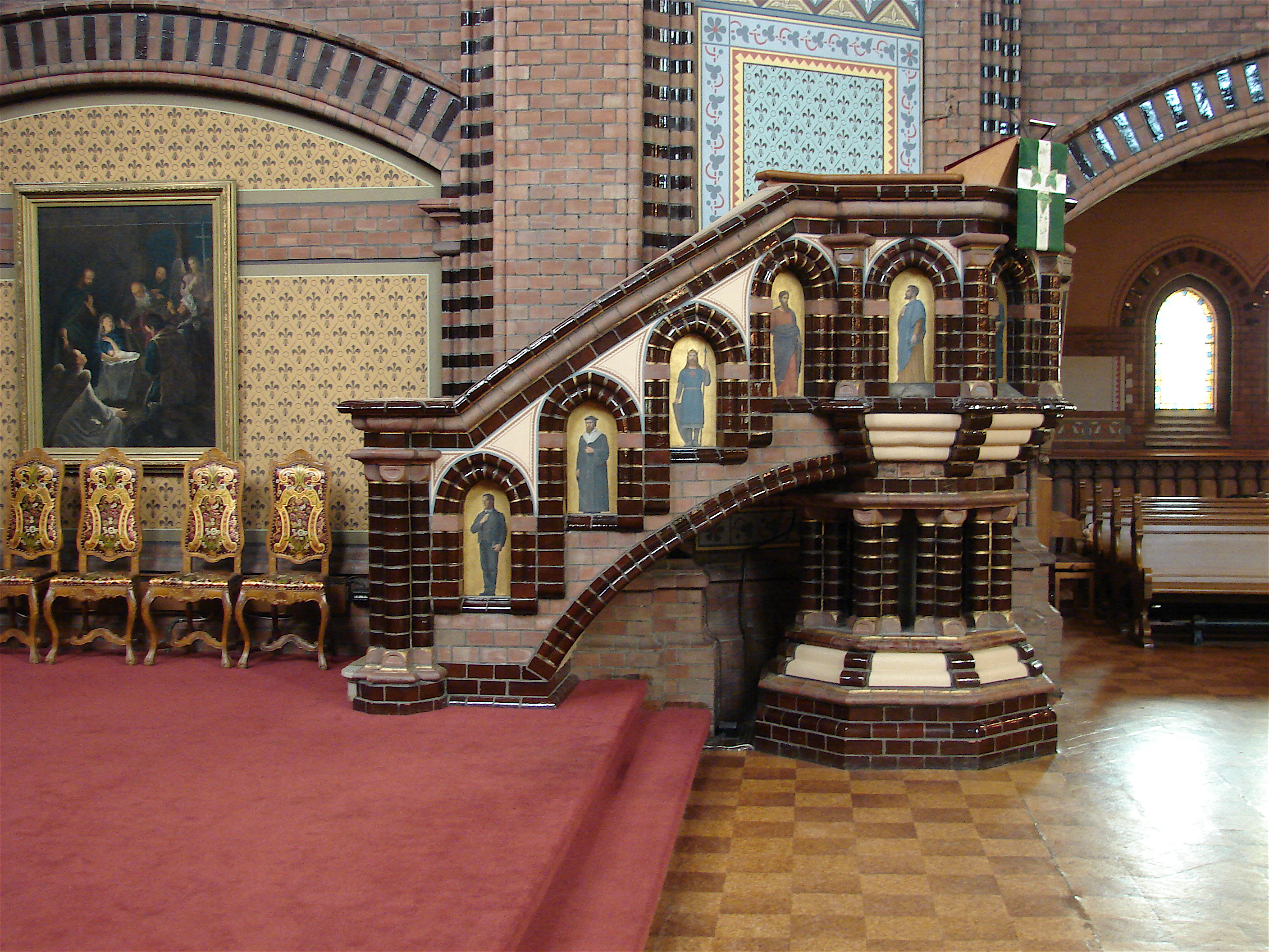 chaire d´église de Skien (Scheen)